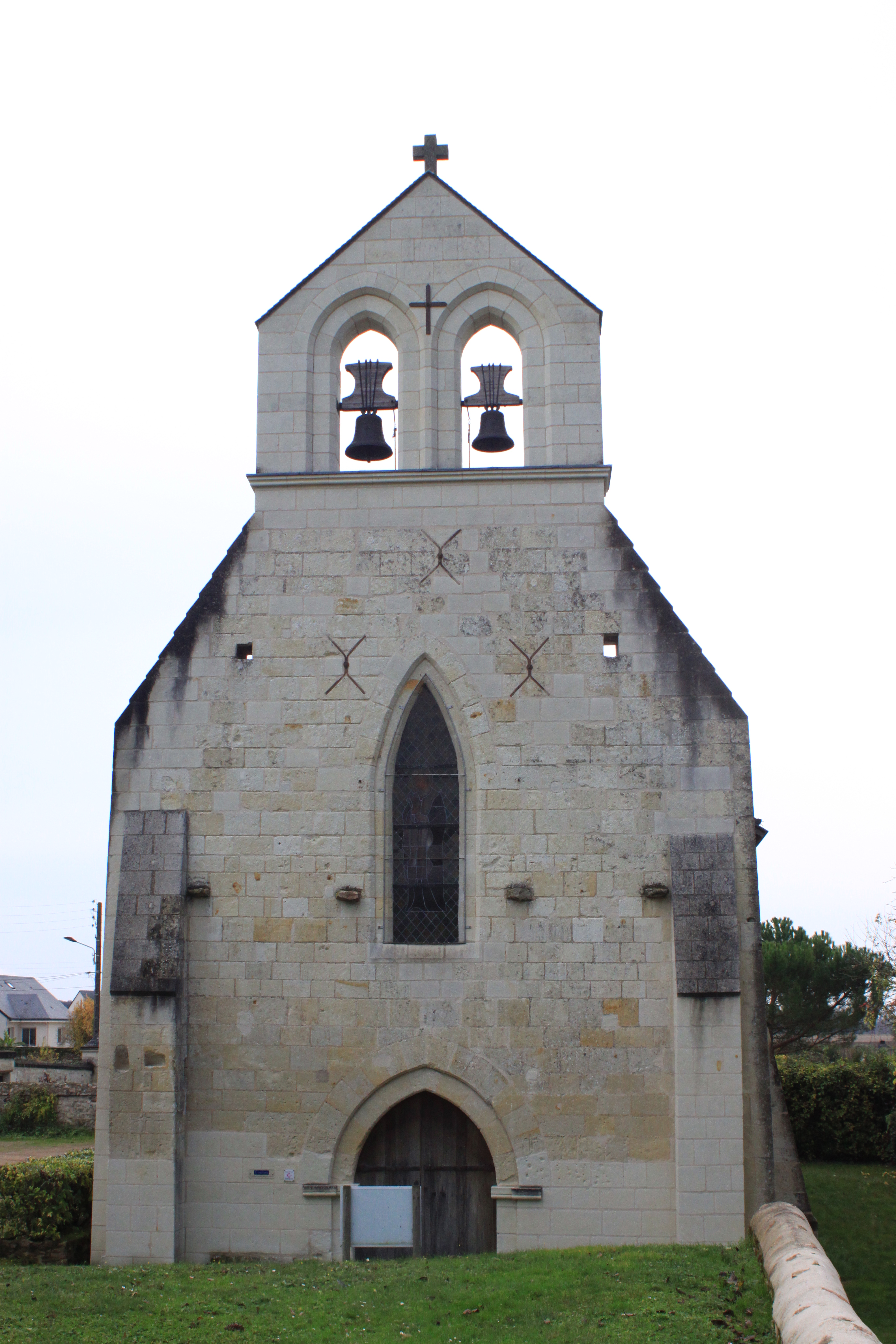 Église Saint-Sulpice de Rou, Fr-49-Rou-Marson.